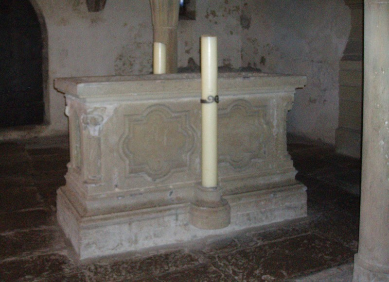 Adelheid-Sarkophag (13. Jhd), Krypta der Stiftskirche in Öhringen